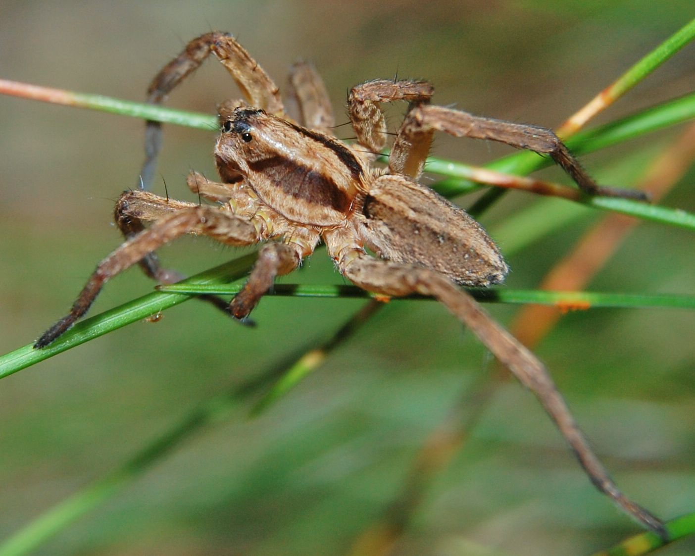 Alopecosa trabalis, female, subad.